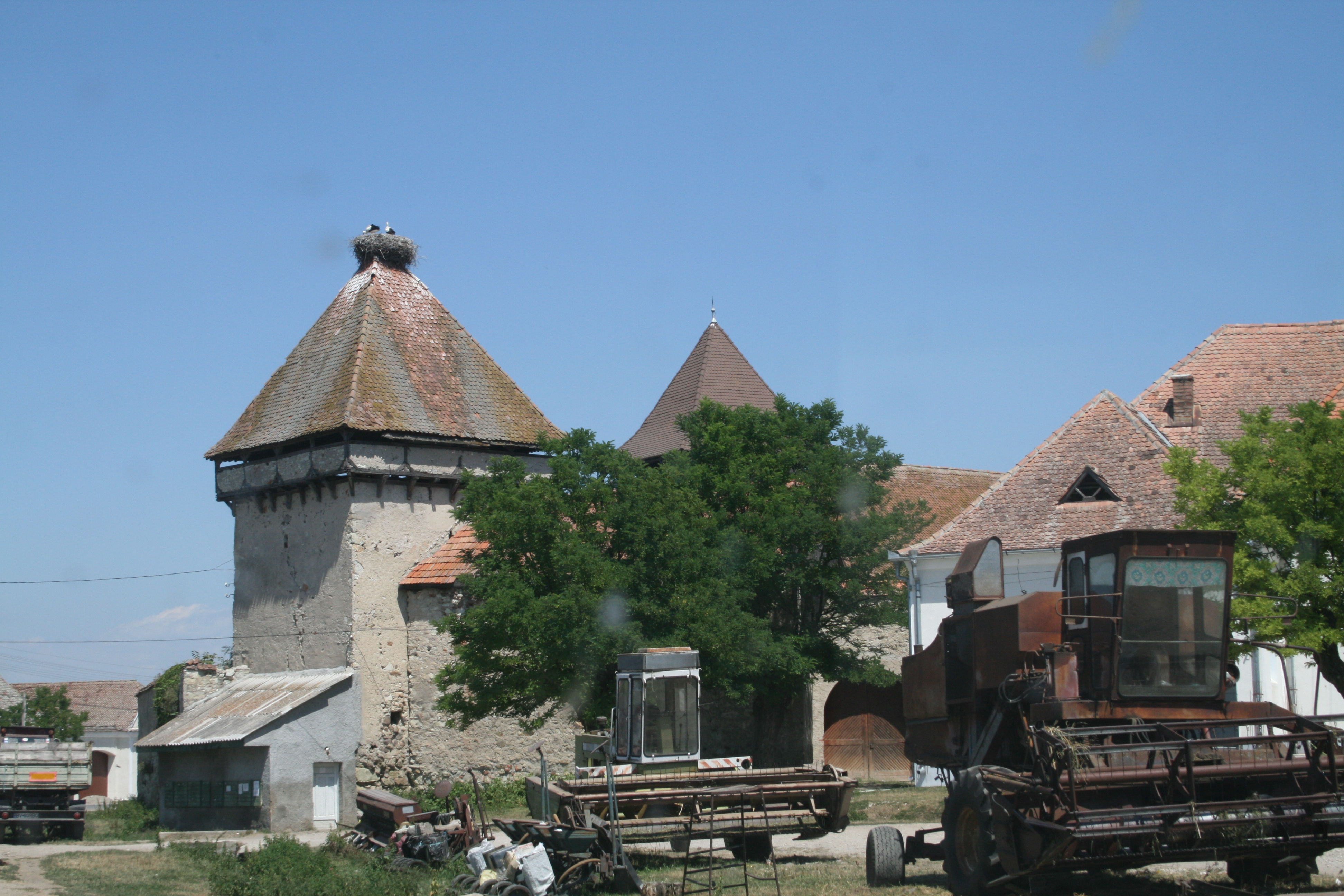 Cata, 2007 iulie, Poza de Ovi D. Pop - Duran`s